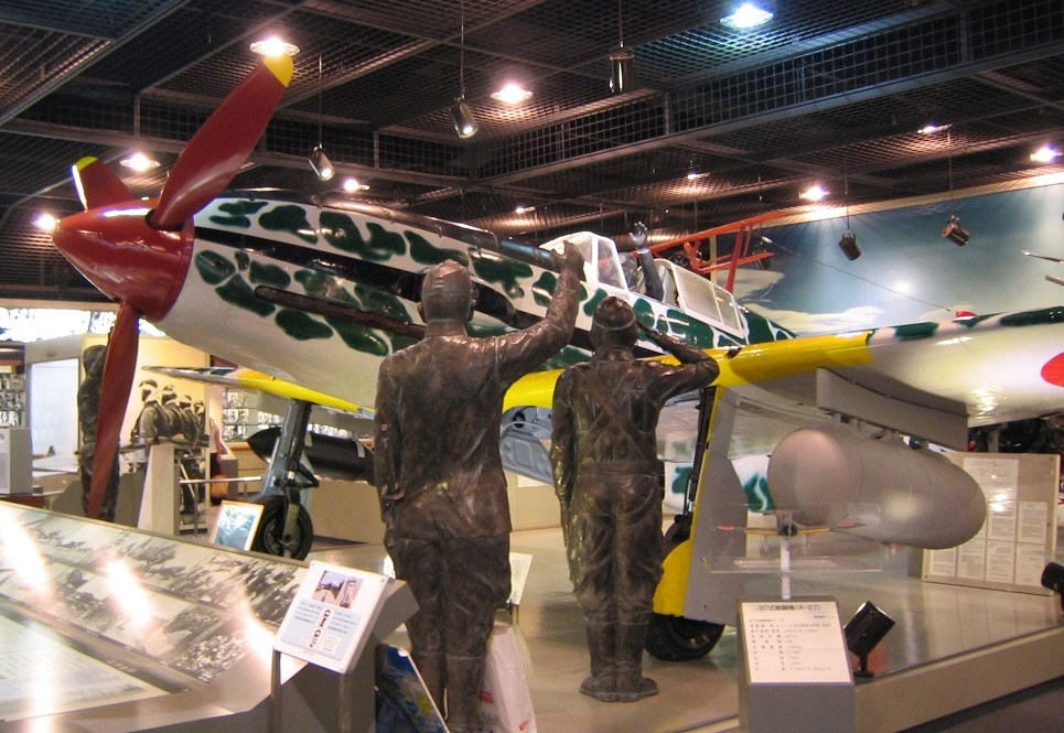 川崎航空機 三式戦闘機 二型 「飛燕」 知覧特攻平和会館